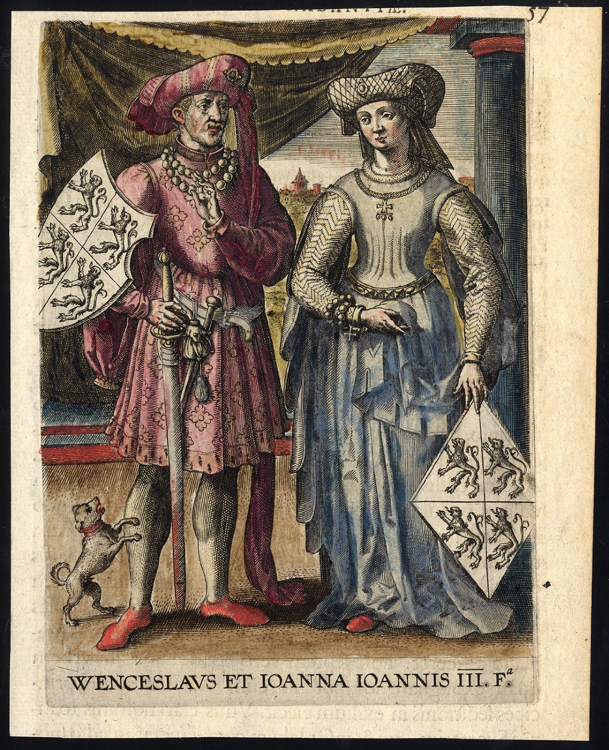 Johana Brabantská a Václav Lucemburský